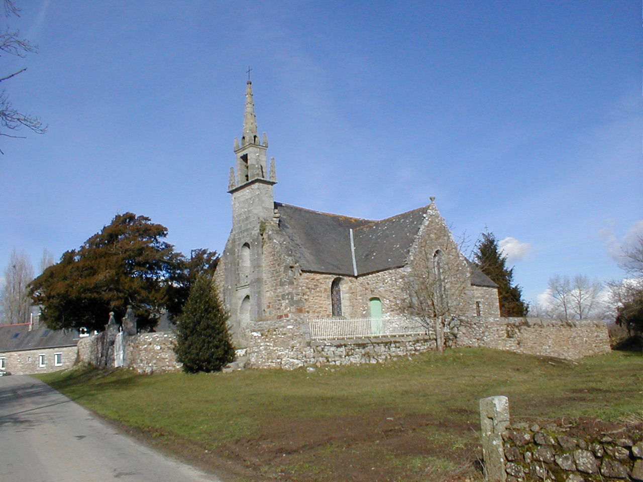 Prad 22. Santez-Anna.